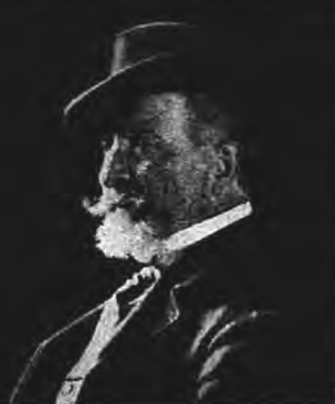 Ritratto del pittore napoletano Raffaello Tancredi (1837-1916)